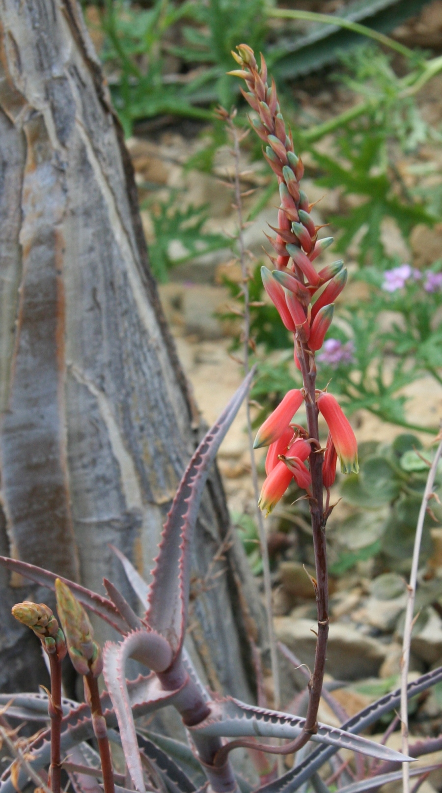 Aloe cremnophila im Botanischen Garten Dresden